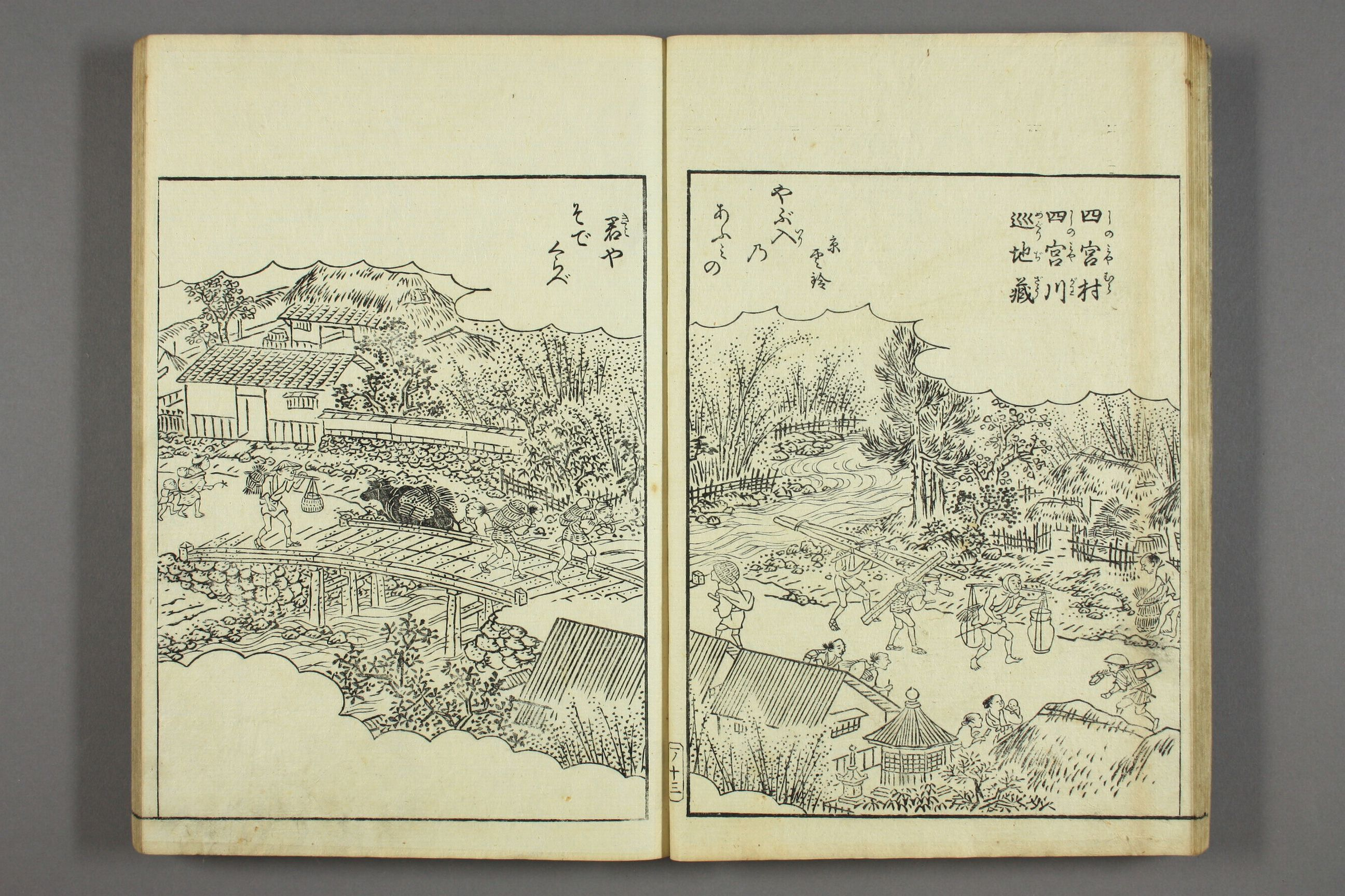 Ise sangu meisho zue - vol 1 p 22